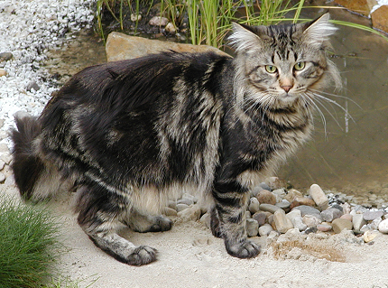 Maine-Coon-Kater „Sammy vom Kaisertal“ (Abstammung von Saska Khan's Chitan & Wildest Charmeur's Dakota Sun, Geburtsdatum: 30.04.2003, Farbe: black-tabby/cl.)